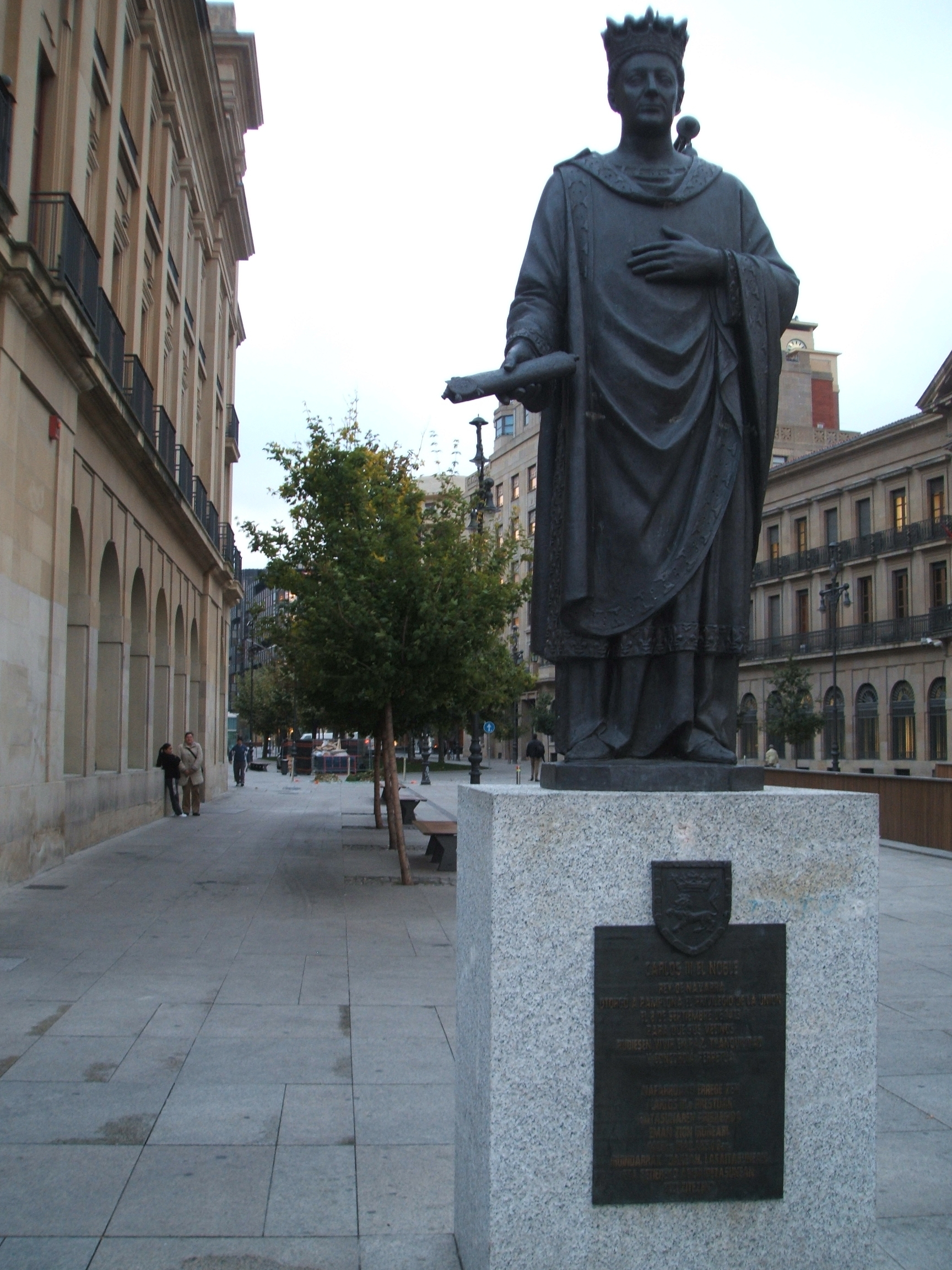 Inicio de la Avenida Carlos III de Pamplona, con la estatua de dicho monarca navarro.